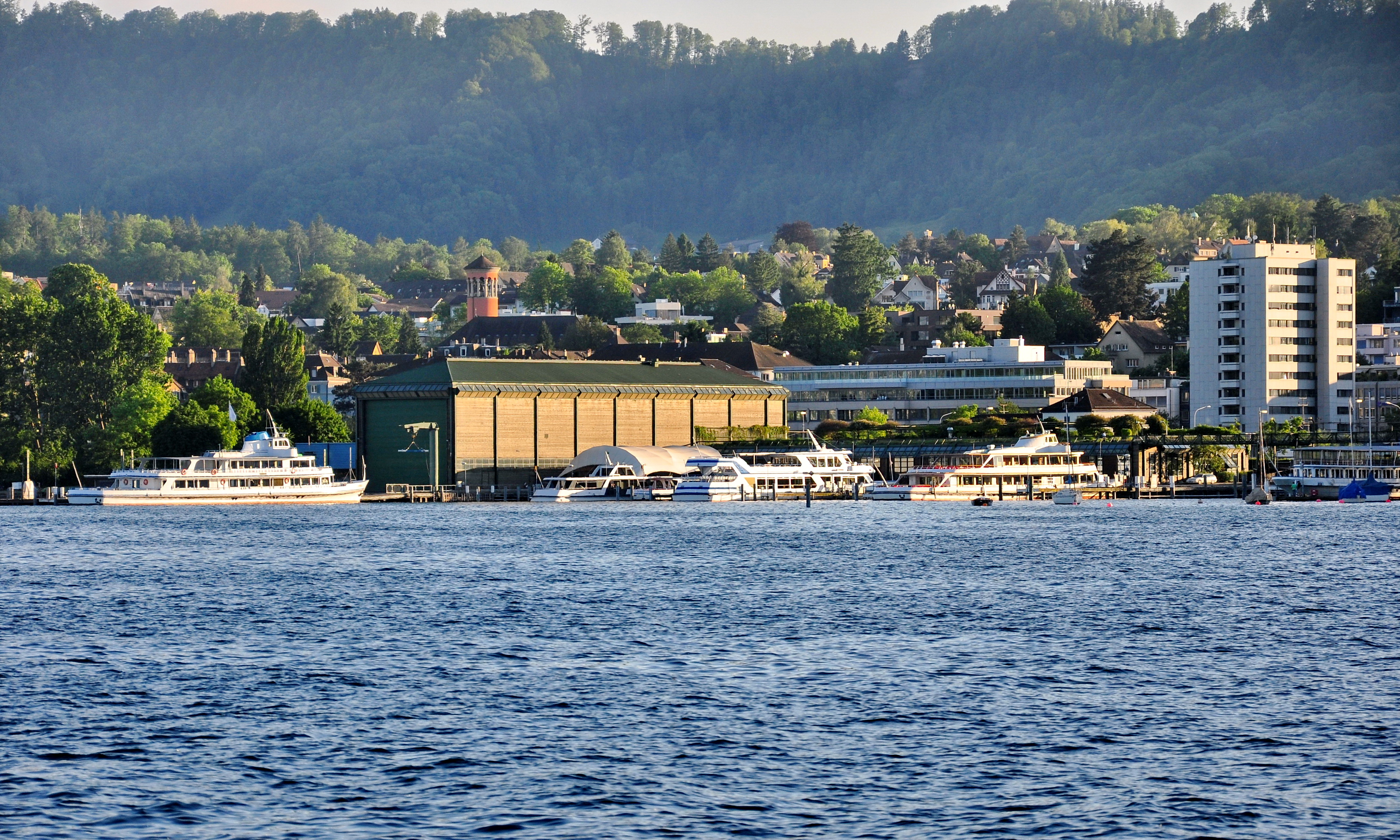 Zürichsee-Schiffahrtsgesellschaft (ZSG) shipyard in Zürich-Wollishofen, as seen from ZSG paddle steamship Stadt Zürich, Felsenegg in the background.